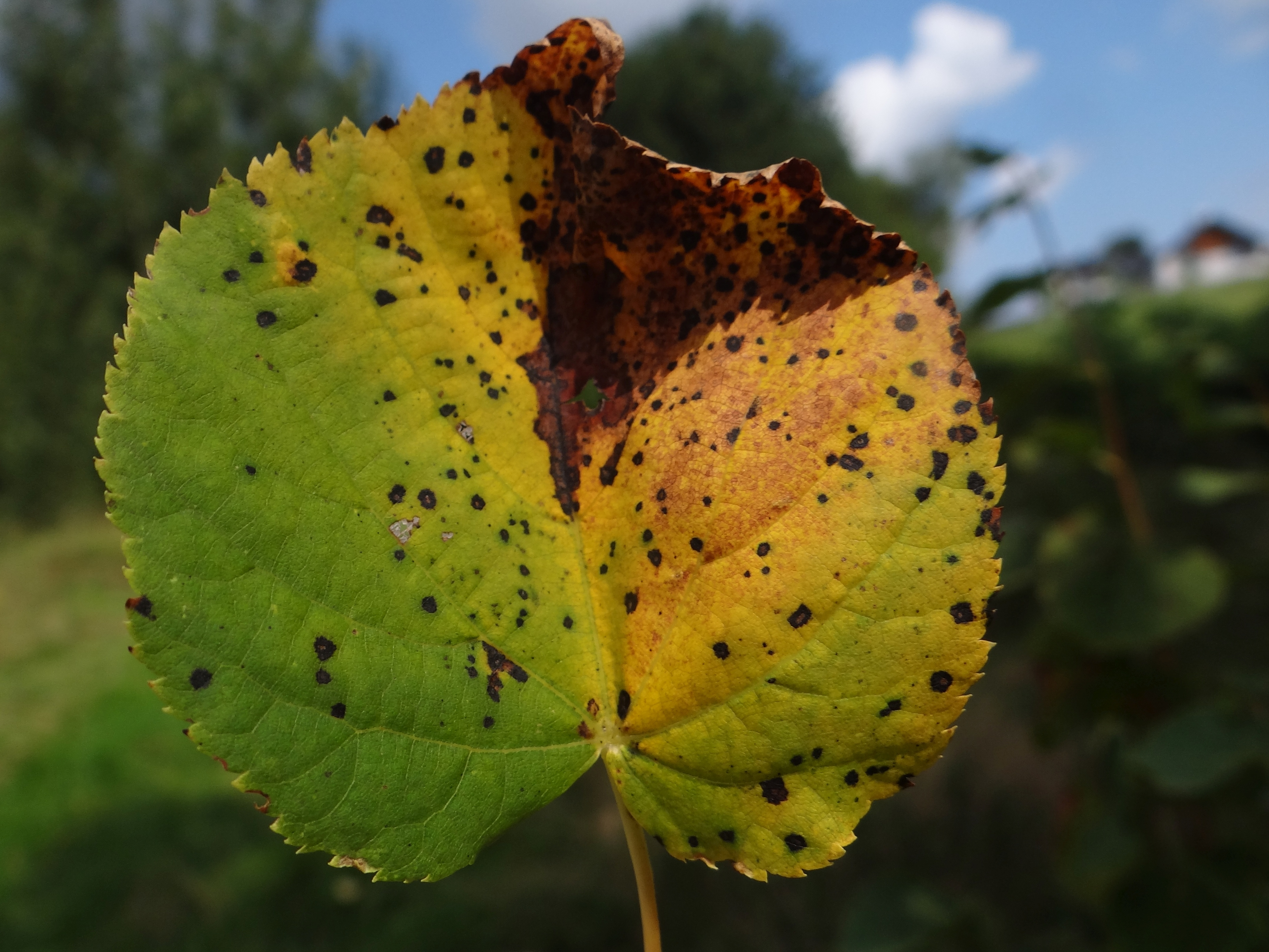 Apiognomonia errabunda on Tilia cordata